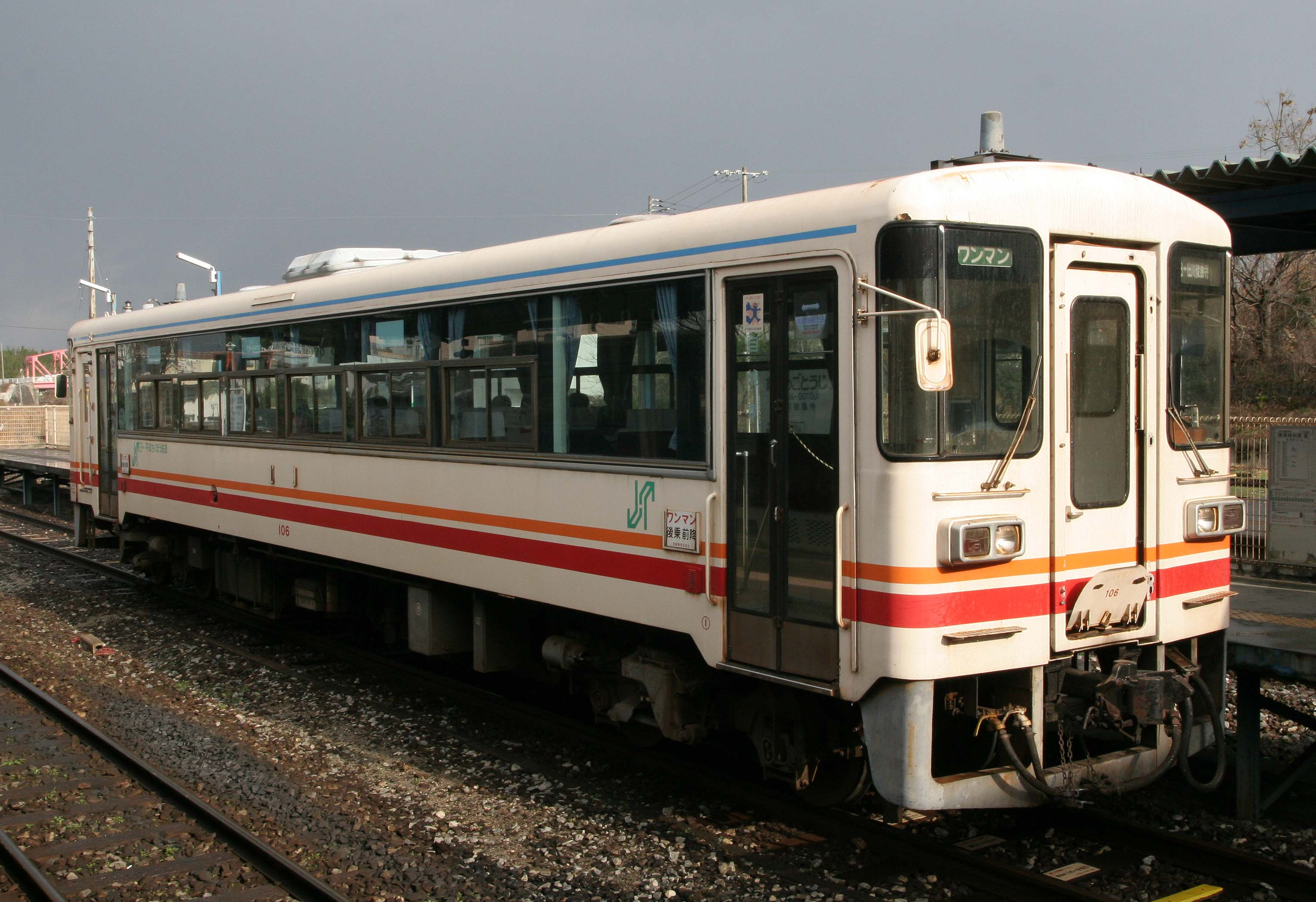 平成筑豊鉄道100形気動車106 田川後藤寺